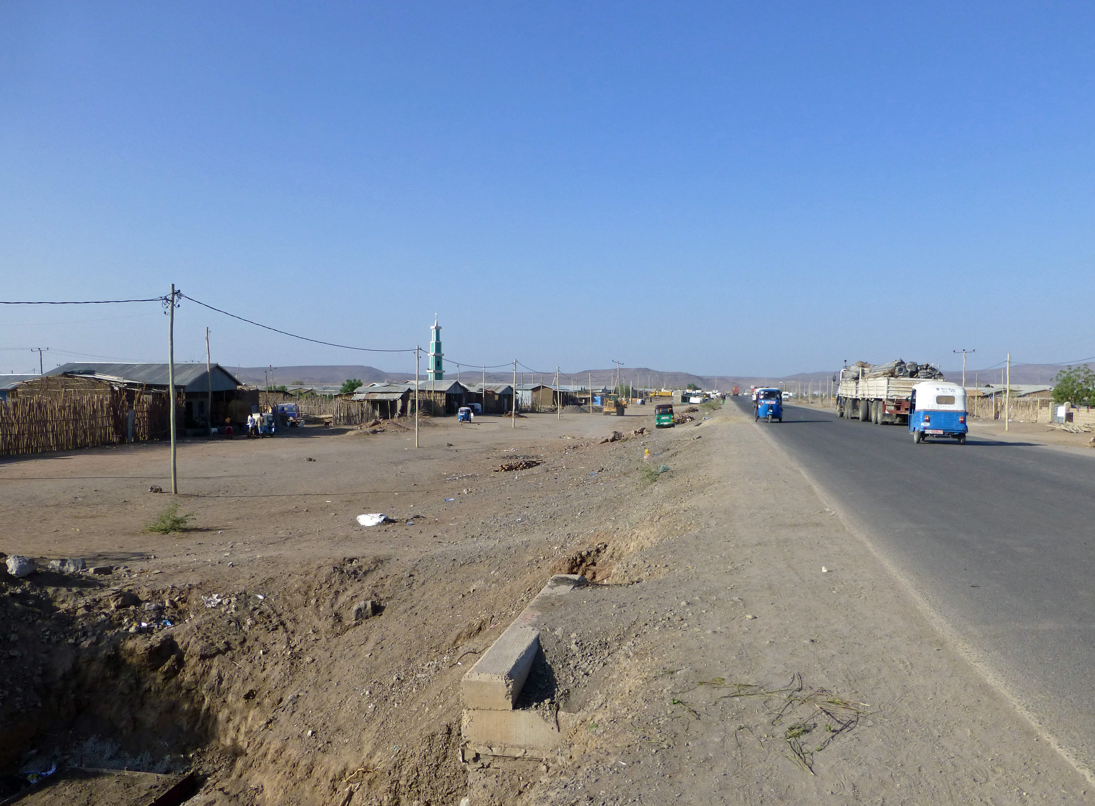 Localité d'Awash (région Afar, Ethiopie) : trafic routier intense